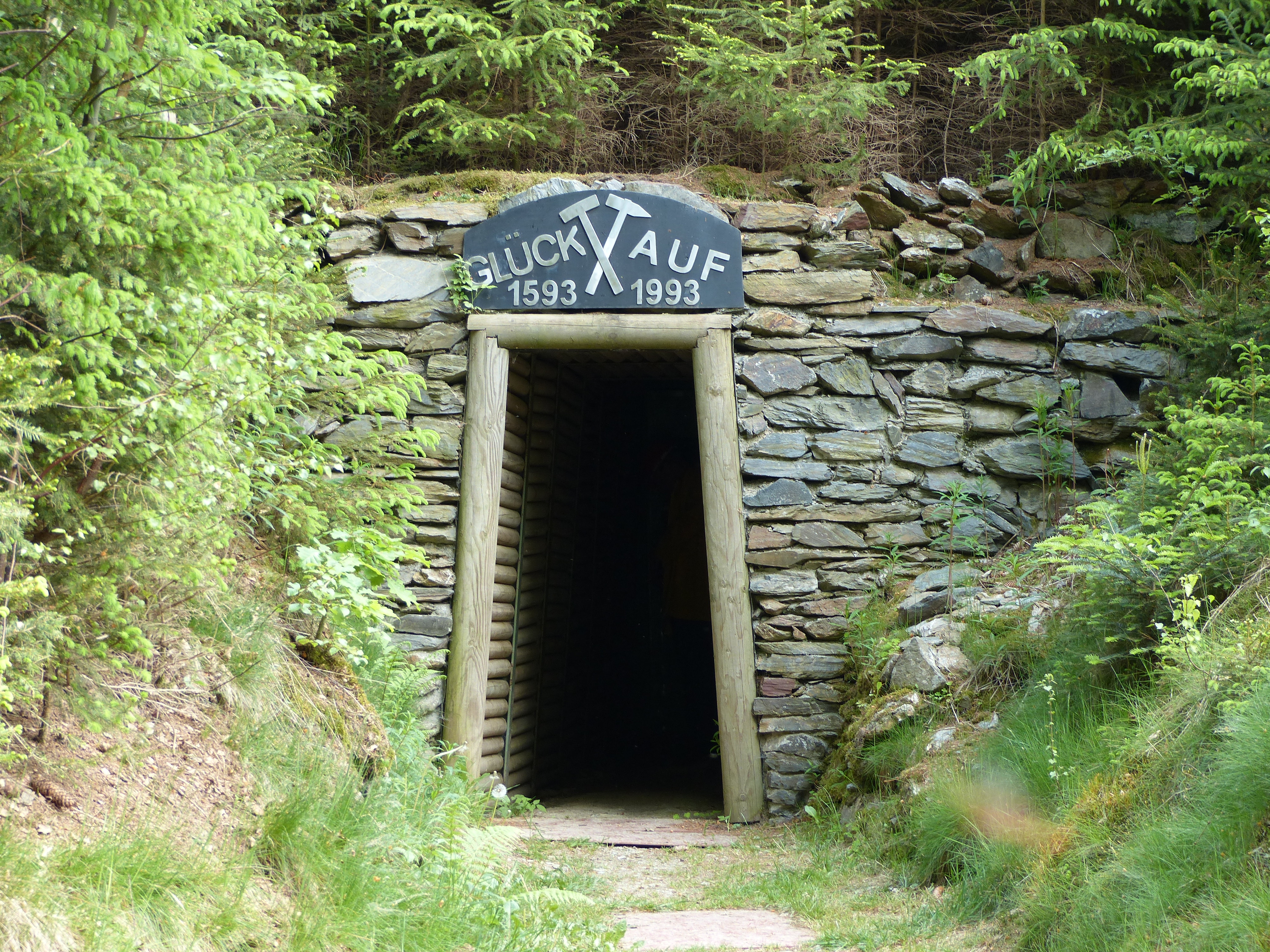 Ansicht von Goldkronach